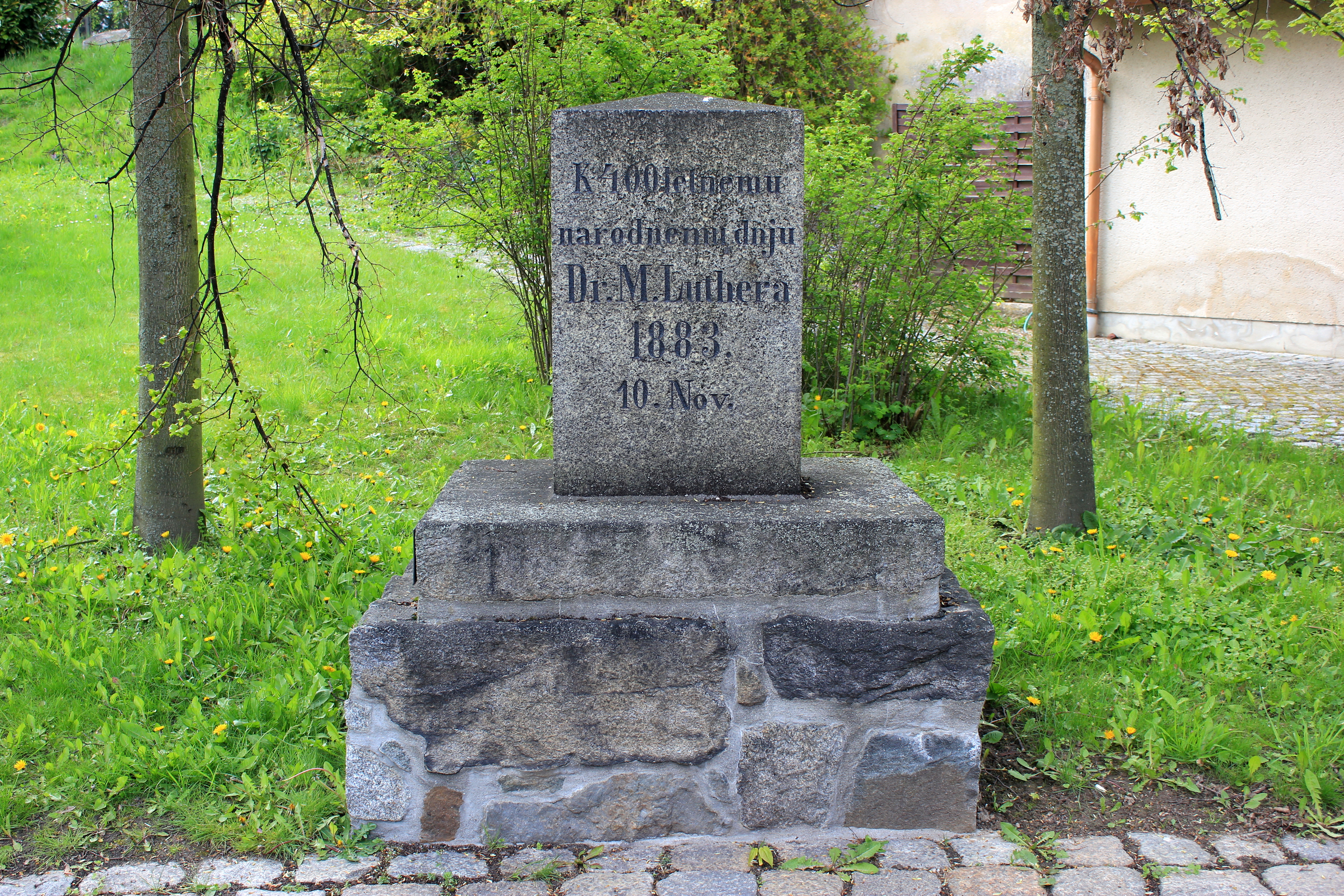 Hornjoserbsce: Serbskorěčny Lutherowy pomnik w Debsecach.